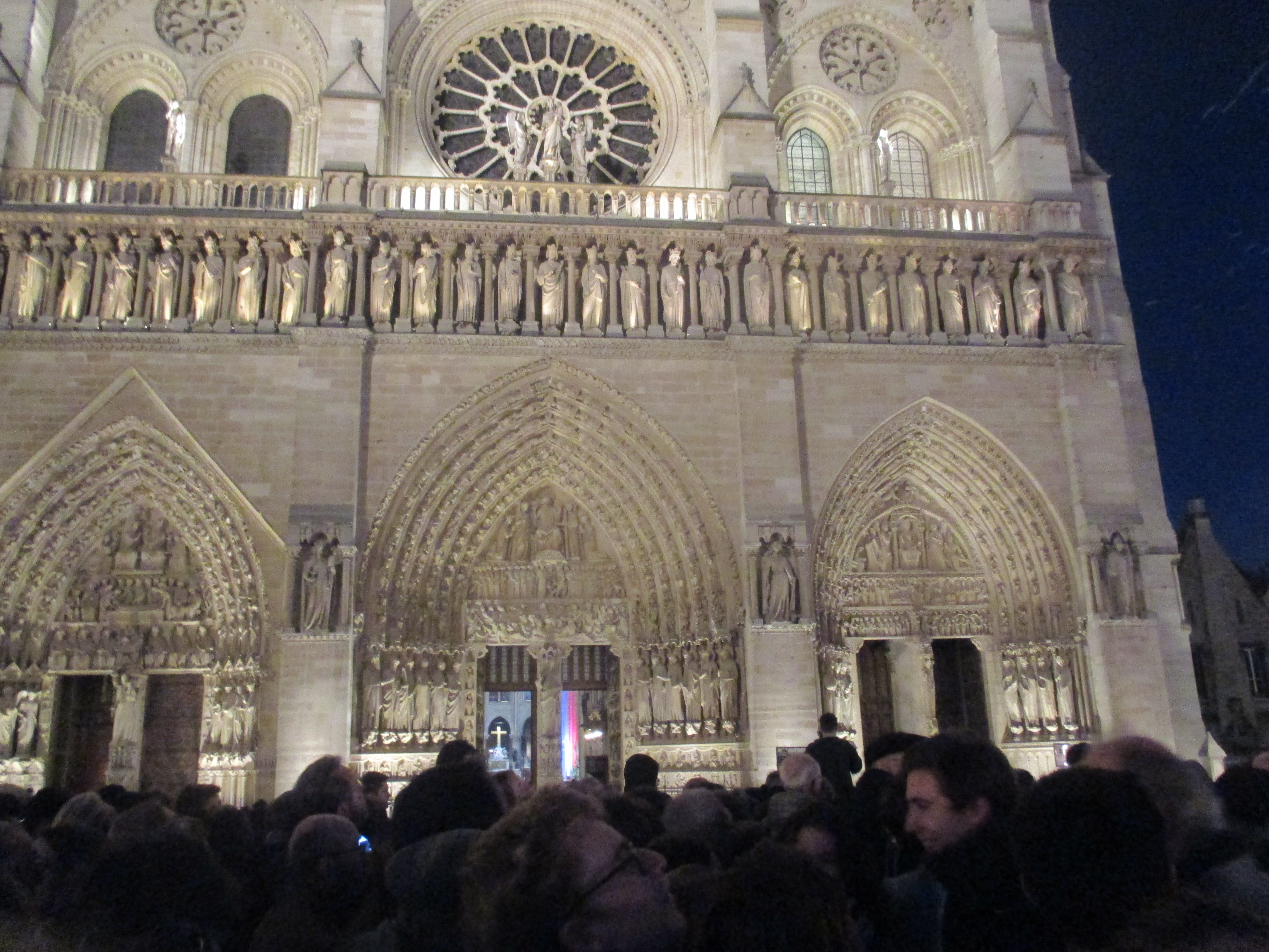 Messe à ND de Paris pour les victimes des attentats du 13 novembre 2015 et pour la France.